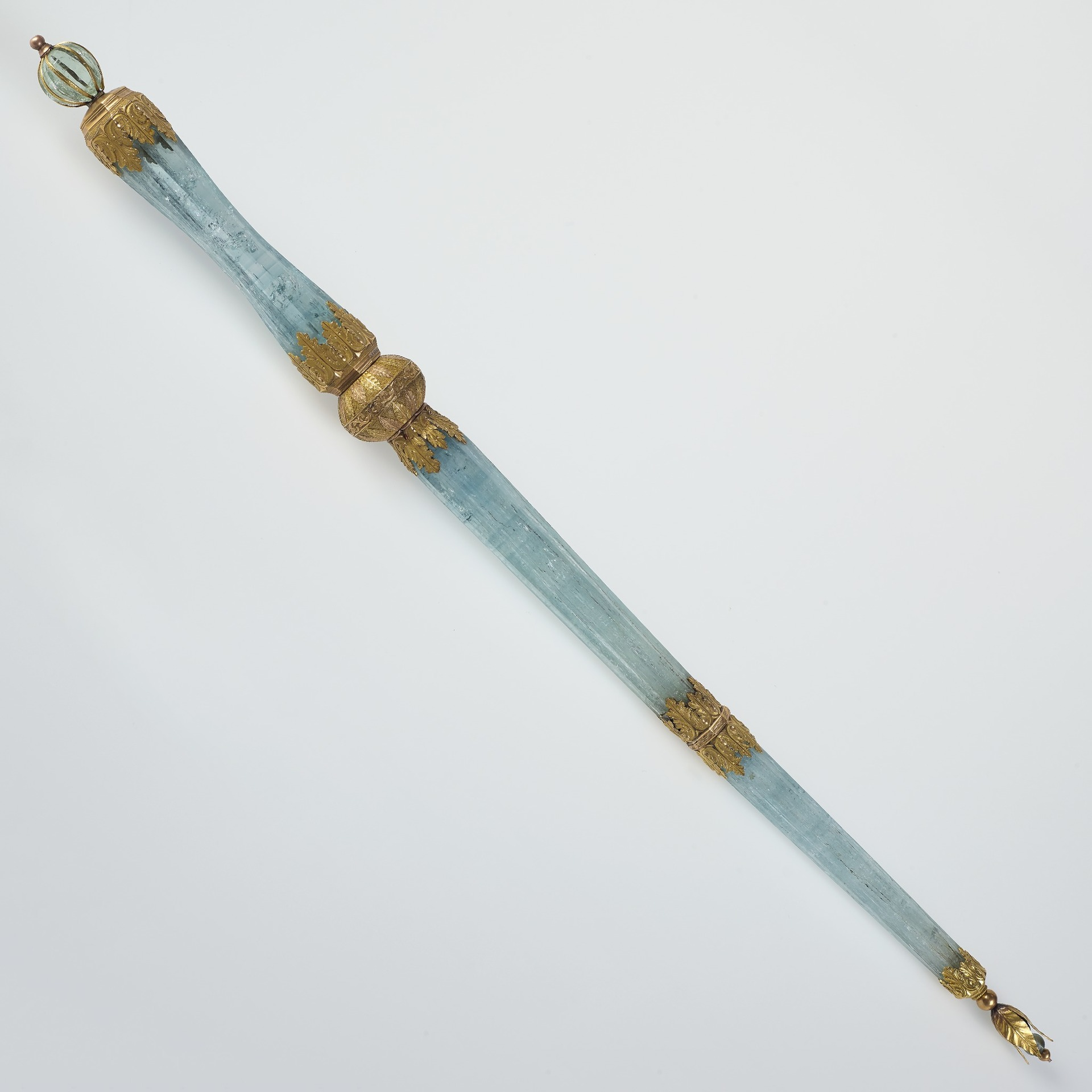 Berło królewskie Stanisława Augusta Poniatowskiego ze zbiorów Zamku Królewskiego w Warszawie